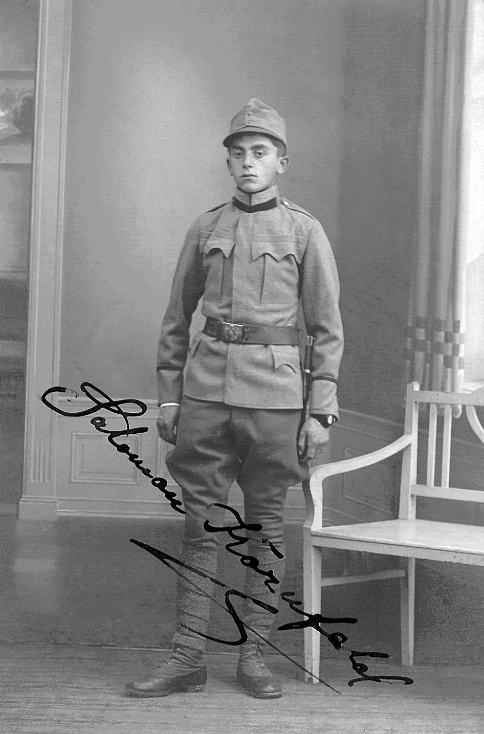 Salomon Kornfeld (Grenkamp), pola esperantisto en uniformo dum la unua mondmilito, 1915